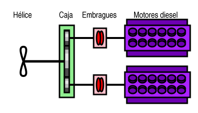 Esquema de un sistema de propulsión CODAD Same as Image:CODAD-diagram.png with Spanish legend. Modified version of a public domain drawing made by Alureiter. Modifications also released into public domain. Idéntica a Image:CODAD-diagram.png con leyendas en español. Versión modificada de un dibujo hecho por Alureiter y puesto por él en el dominio público. Las modificaciones son también colocadas en el dominio público.